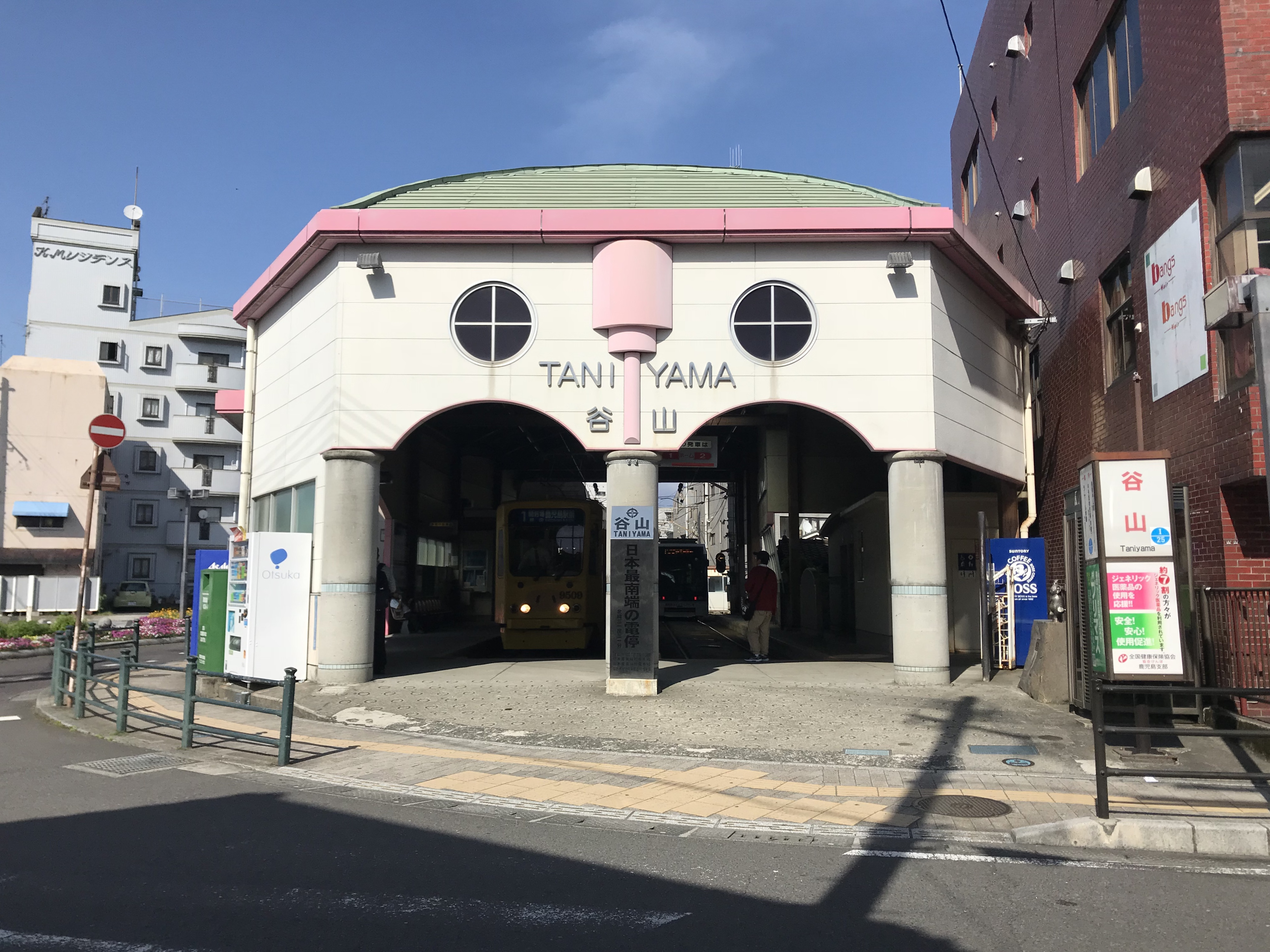 谷山電停の駅舎